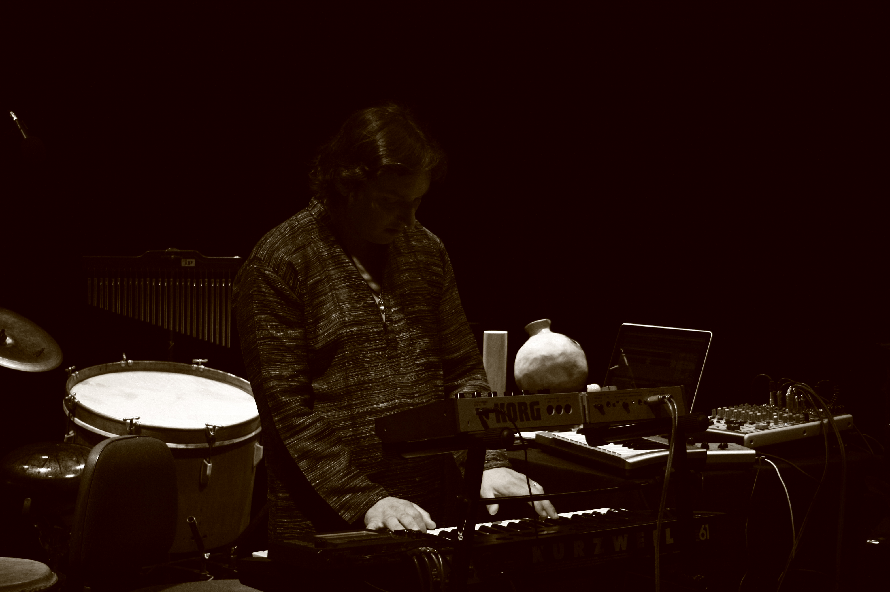 Pablo Ojeda Music